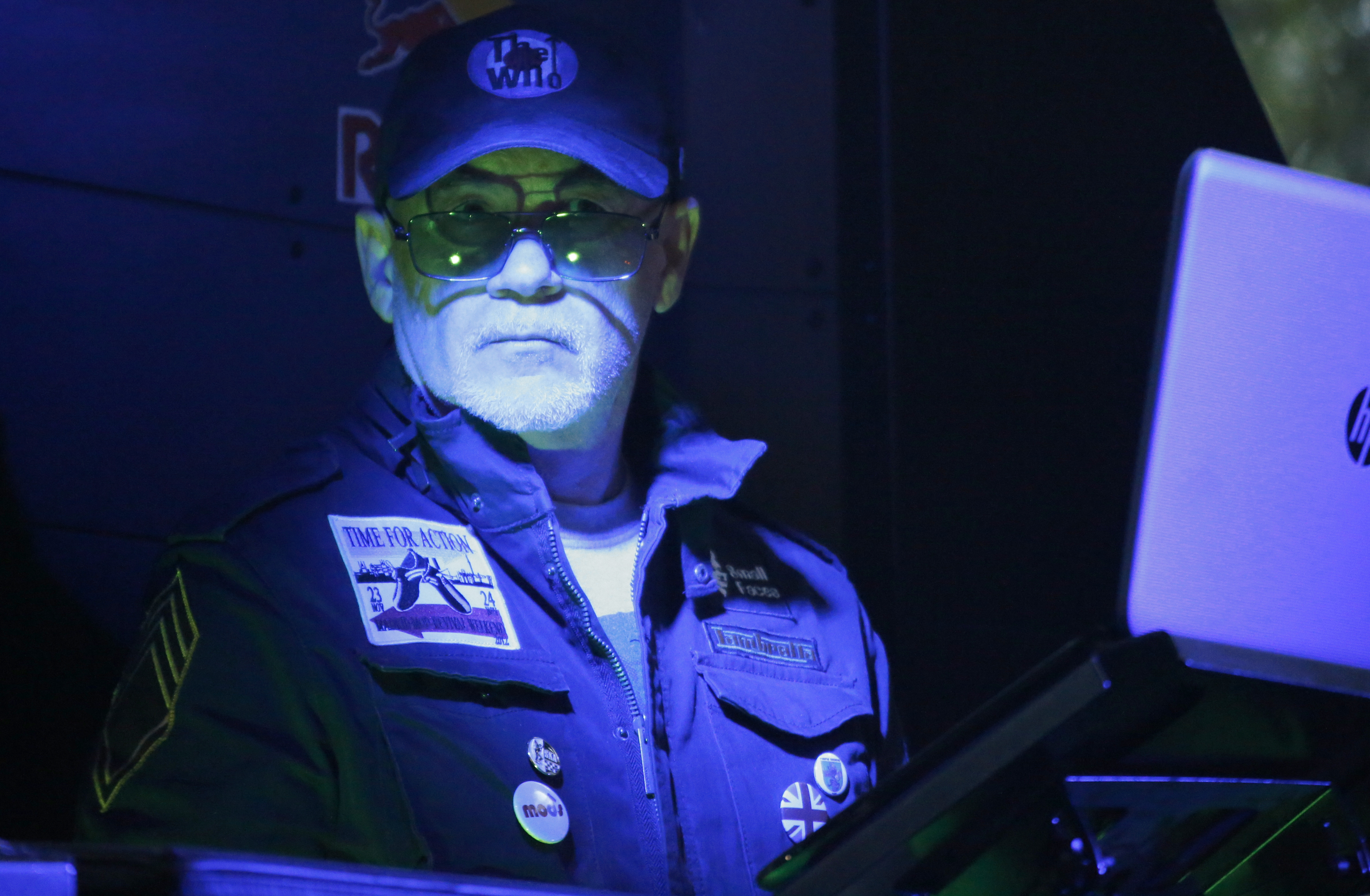 Alfredo Duro, comentarista deportivo y DJ español durante el festival Palencia Sonora 2018.